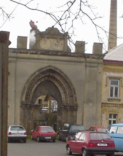 Eingagsportal (Nordportal) der Klosterkirche